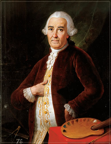 Autorretrato del pintor español José Vergara Gimeno (1726-1799).